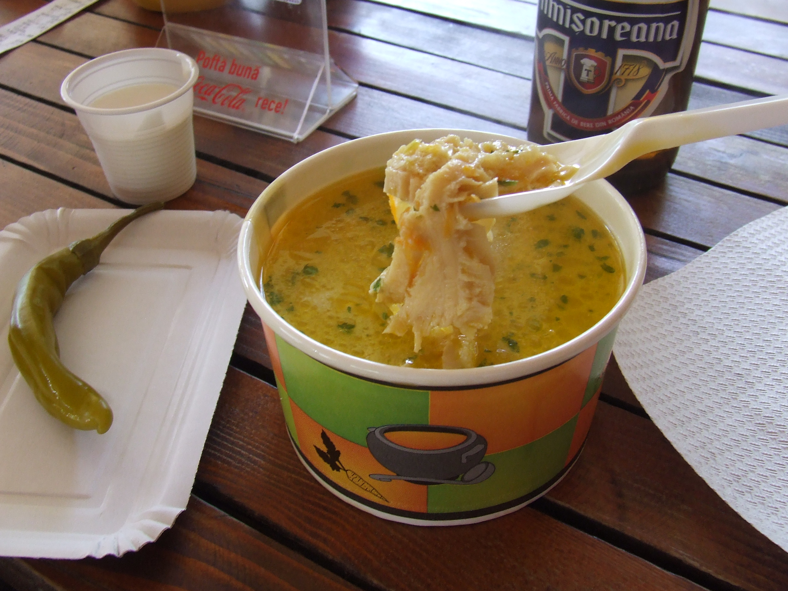 Pacalleves Erdélyben a Gyilkos-tónál